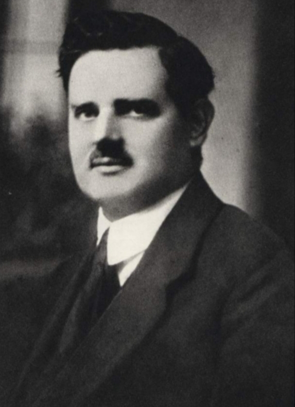 Srpskohrvatski / српскохрватски: Filip Filipović (1878-1938)